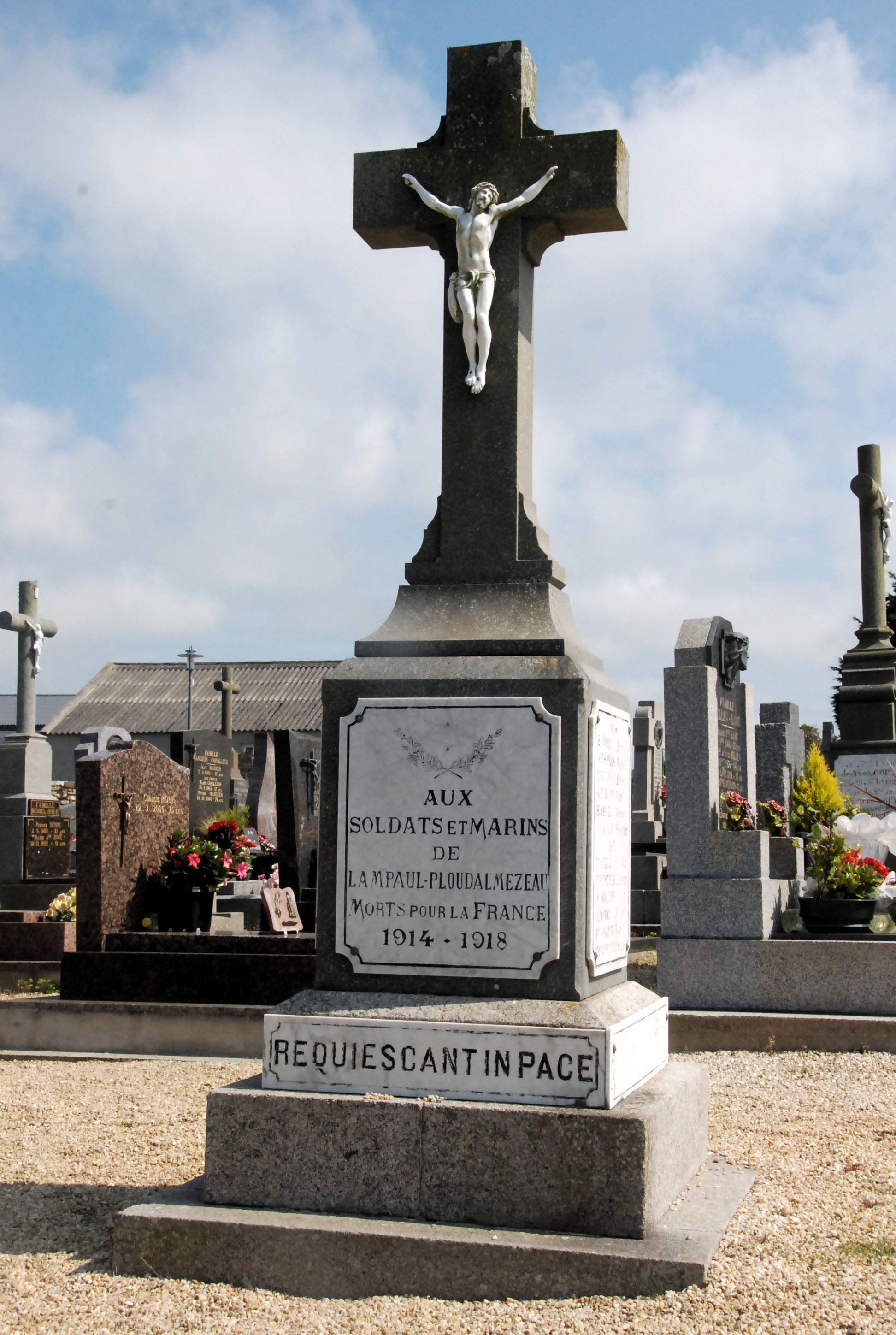 Monument aux morts - Lampaul-Plouarzel-29